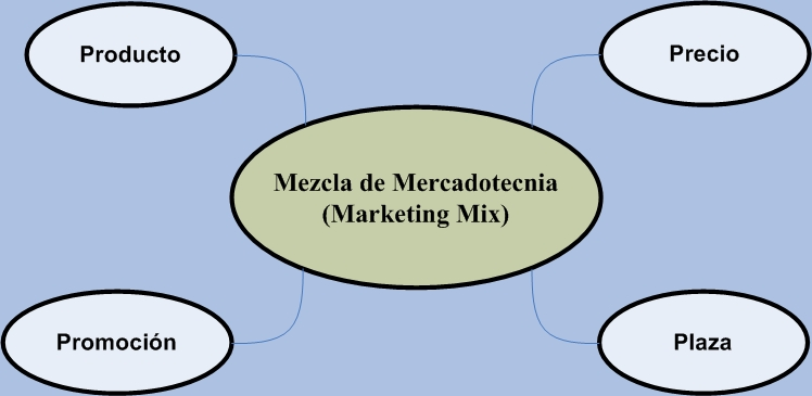 Representación grafica de la interacción de los componentes de la mezcla de mercadotécnia